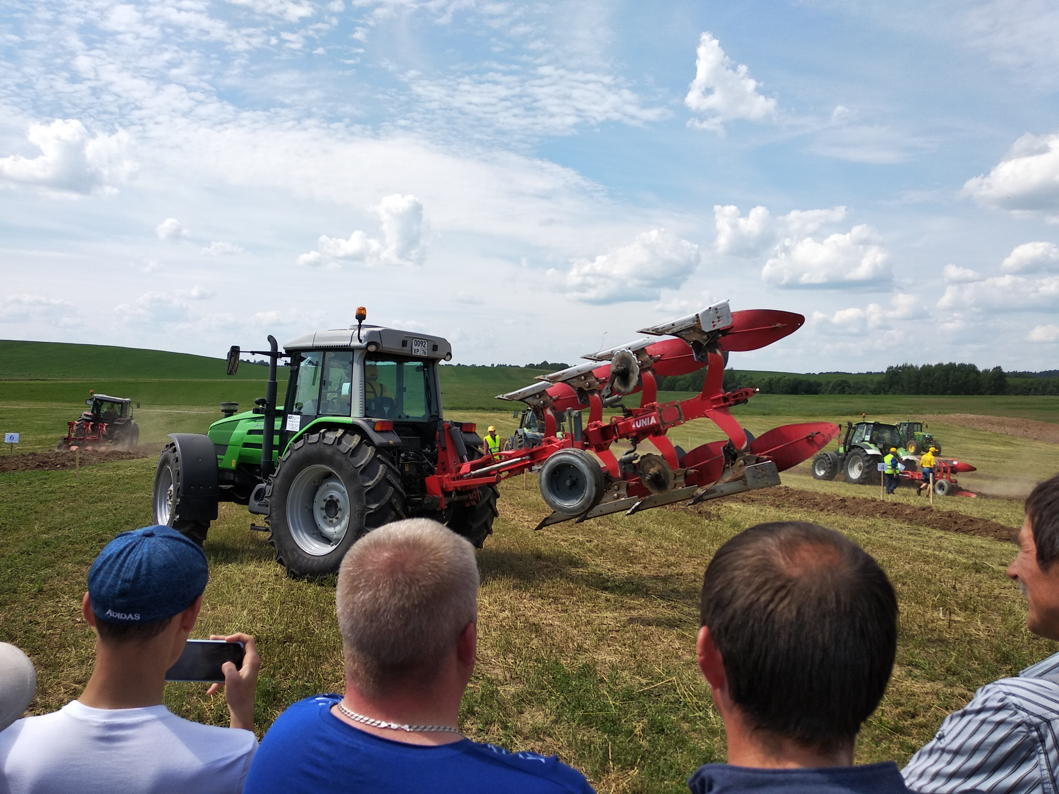 Конкурс пахарей на полях МСП (совхоза) Киргизстан рядом с селом Шурскол